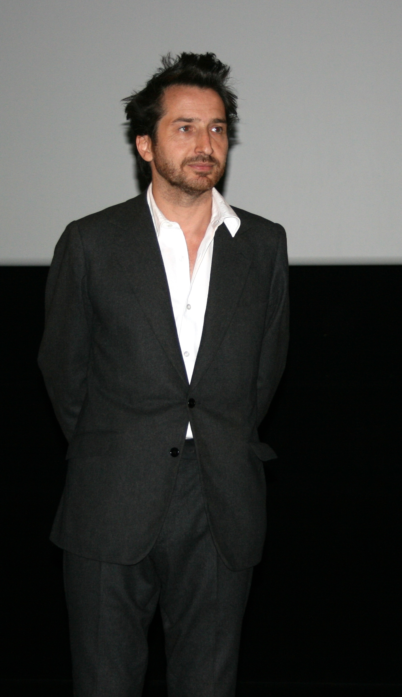 Édouard Baer à l'avant-première de Passe-passe diffusée à l'UGC Ciné Cité Les Halles, à Paris.